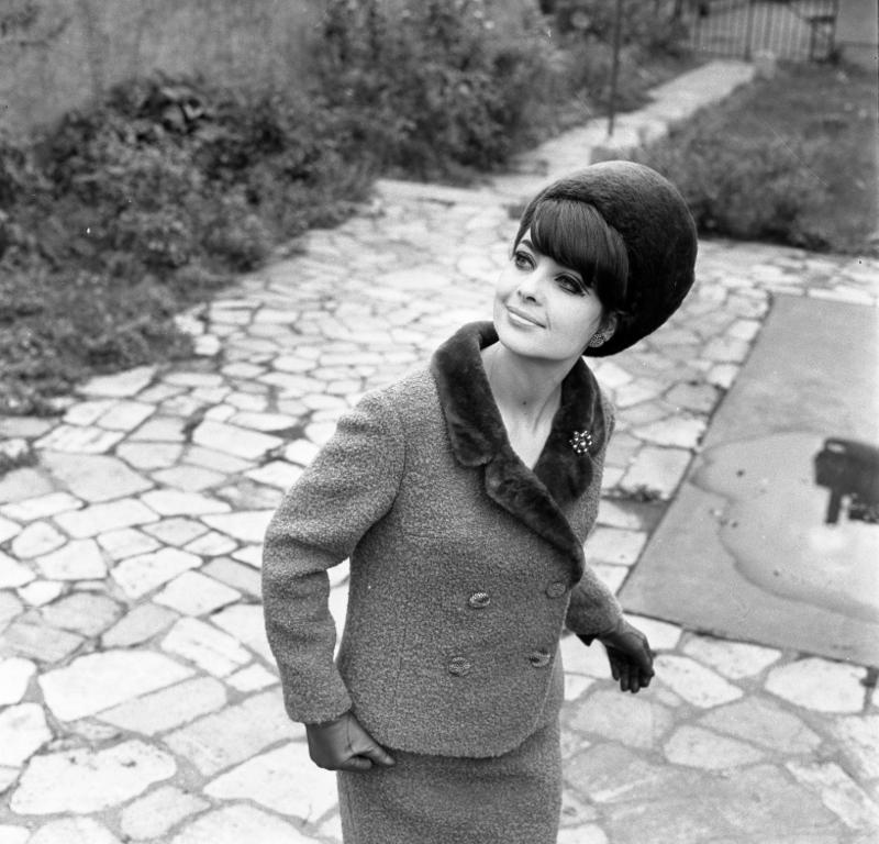 Leipzig, Messe, Kostüm mit Nutriakragen Zentralbild, Hochneder, 5.9.1966, Leipziger Herbstmesse 1966 - Internationale Messemodenschau im Kulturzentrum Südwest Die Firma Mönter und Stieler aus Dessau zeigte das Modell "Lorraine". Es ist ein nougatfarbenes Boucle-Kostüm in femininem Stil mit tiefgezogener Fasson. Entscheidender Akzent sind Nutriakragen und gleiche Kopfbedeckung.